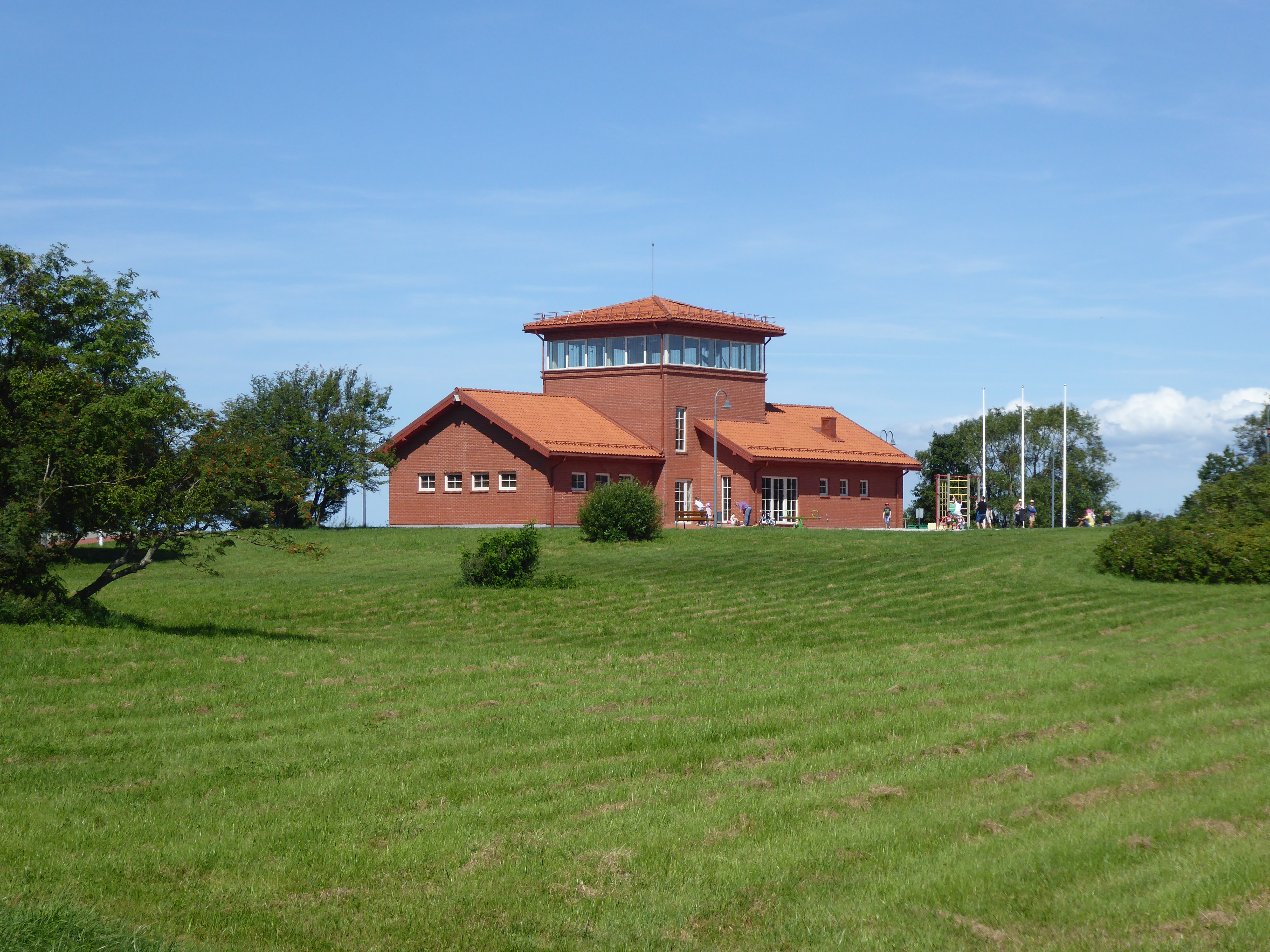 Vogelwarte Ventės rago (Windenburger Eck)